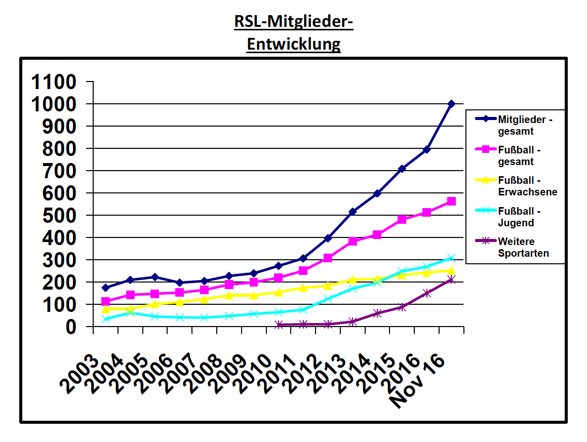 Mitglieder Entwicklung Roter Stern Leipzig